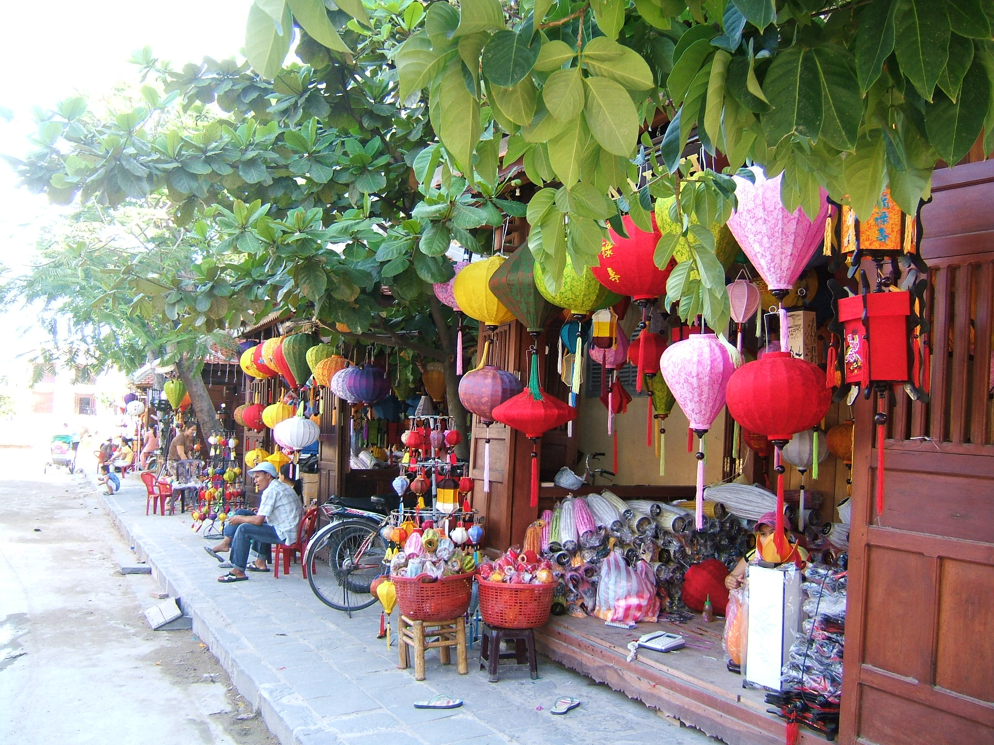 Paper lanterns in Hoi An, Vietnam